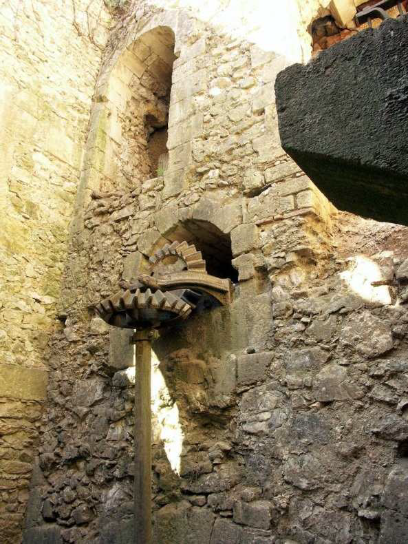 Rouage du Moulin de Sijas